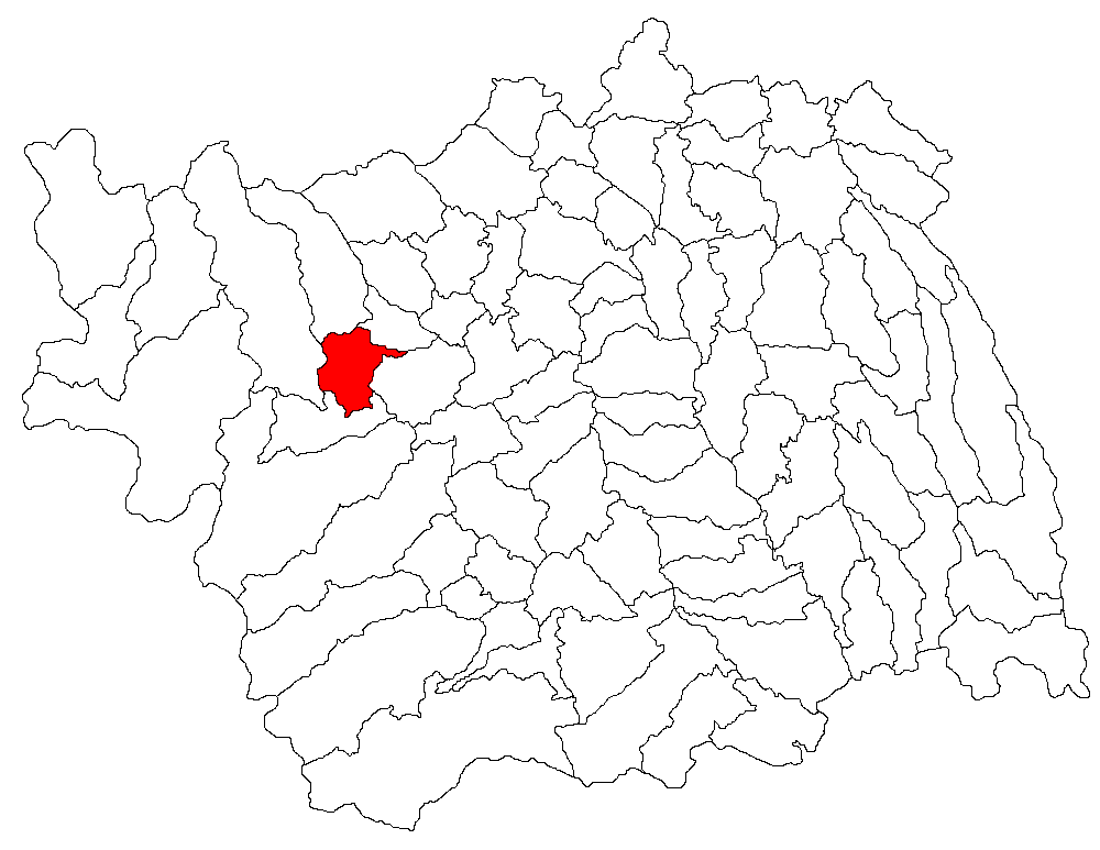 Categorie:Hărţi ale judeţului Bacău